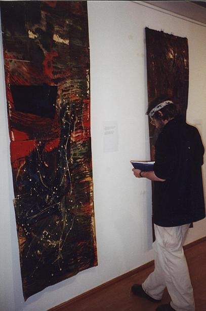 Wystawa prac Ivana Preisslera